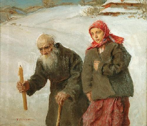 На Громницы